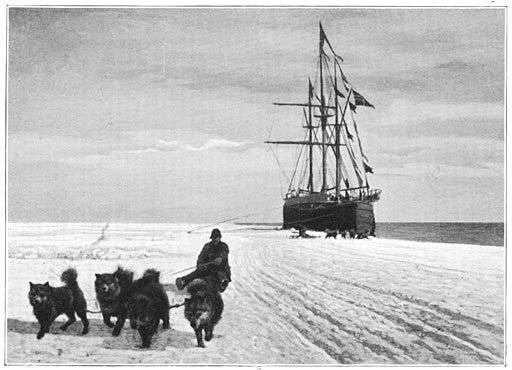 Aan de Zuidpool